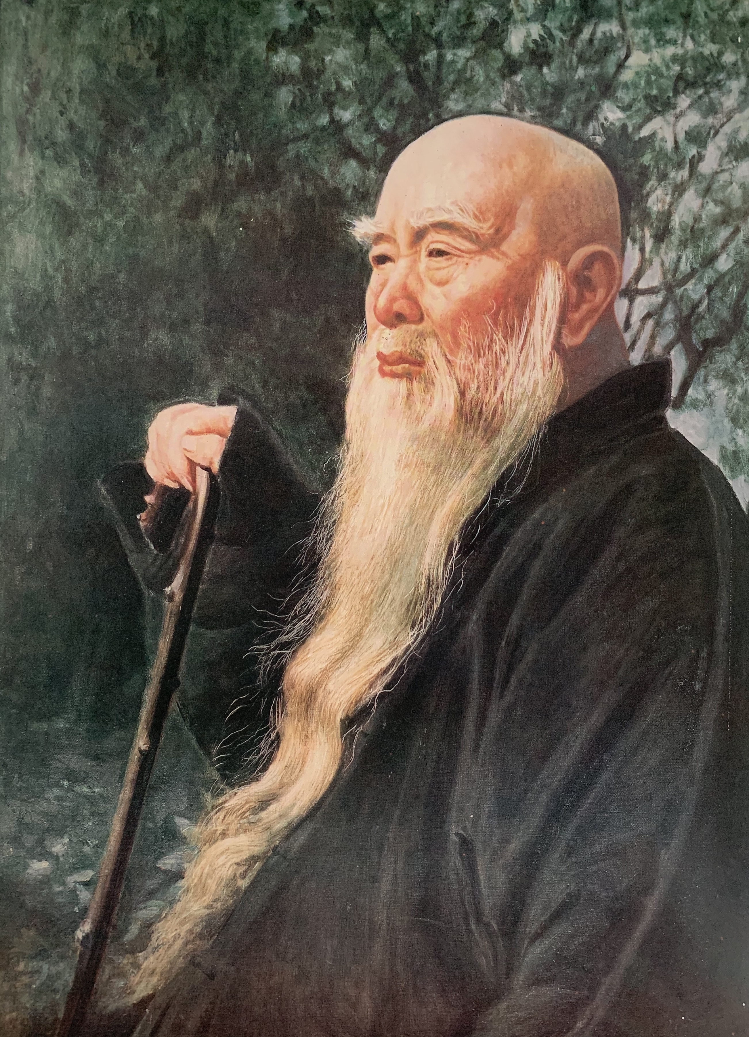 李梅樹作品：右老畫像(太平老人)，1962年，油畫。李梅樹描繪髯冉細膩，右老神情奕奕，標準的長袍很有親和力道。此畫文化大學張其昀創辦人收藏於于右任紀念堂。